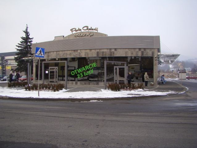 Dworzec Autobusowy Mszana Dolna